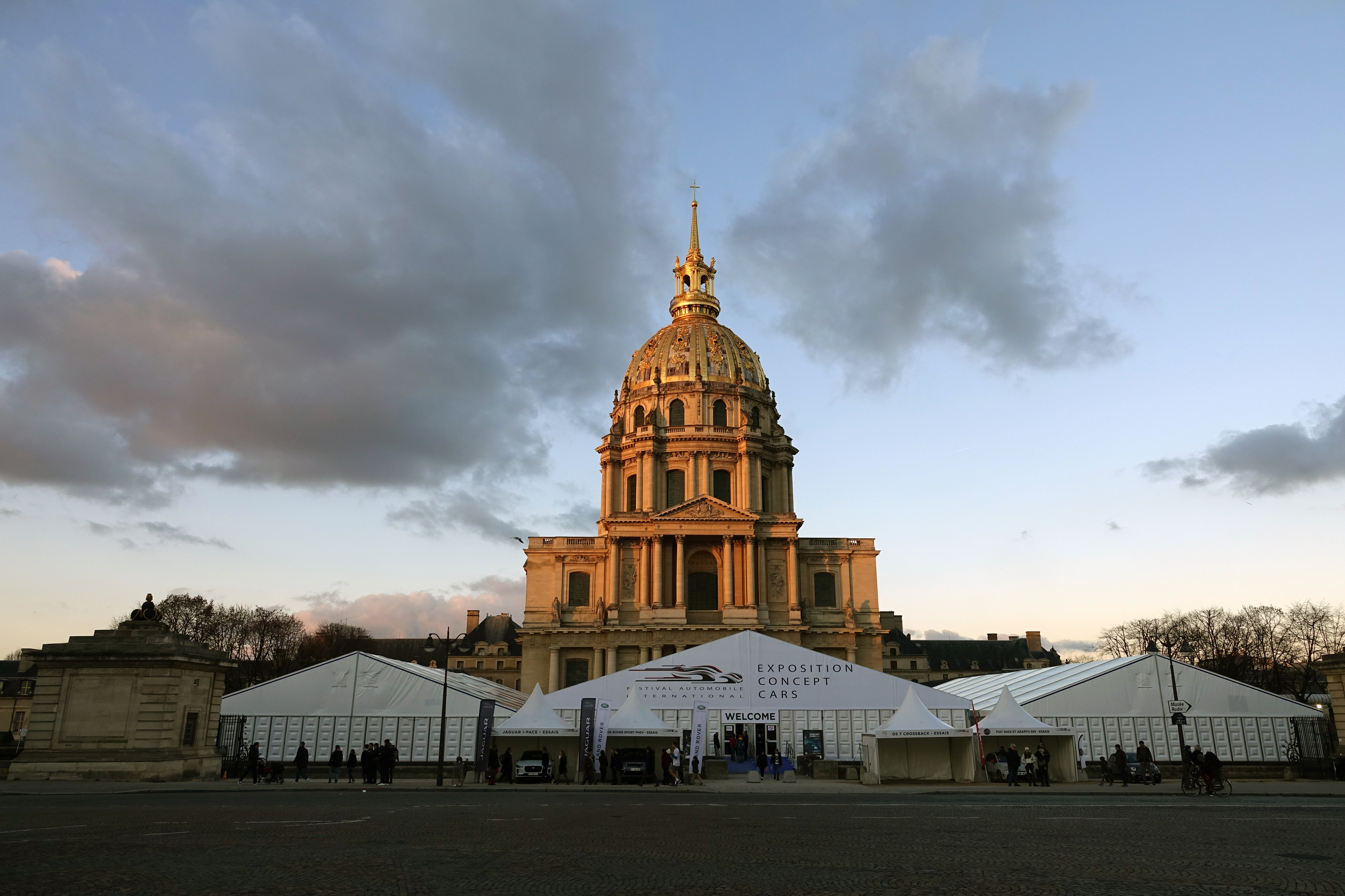 Festival automobile international 2019 aux Invalides (Paris)